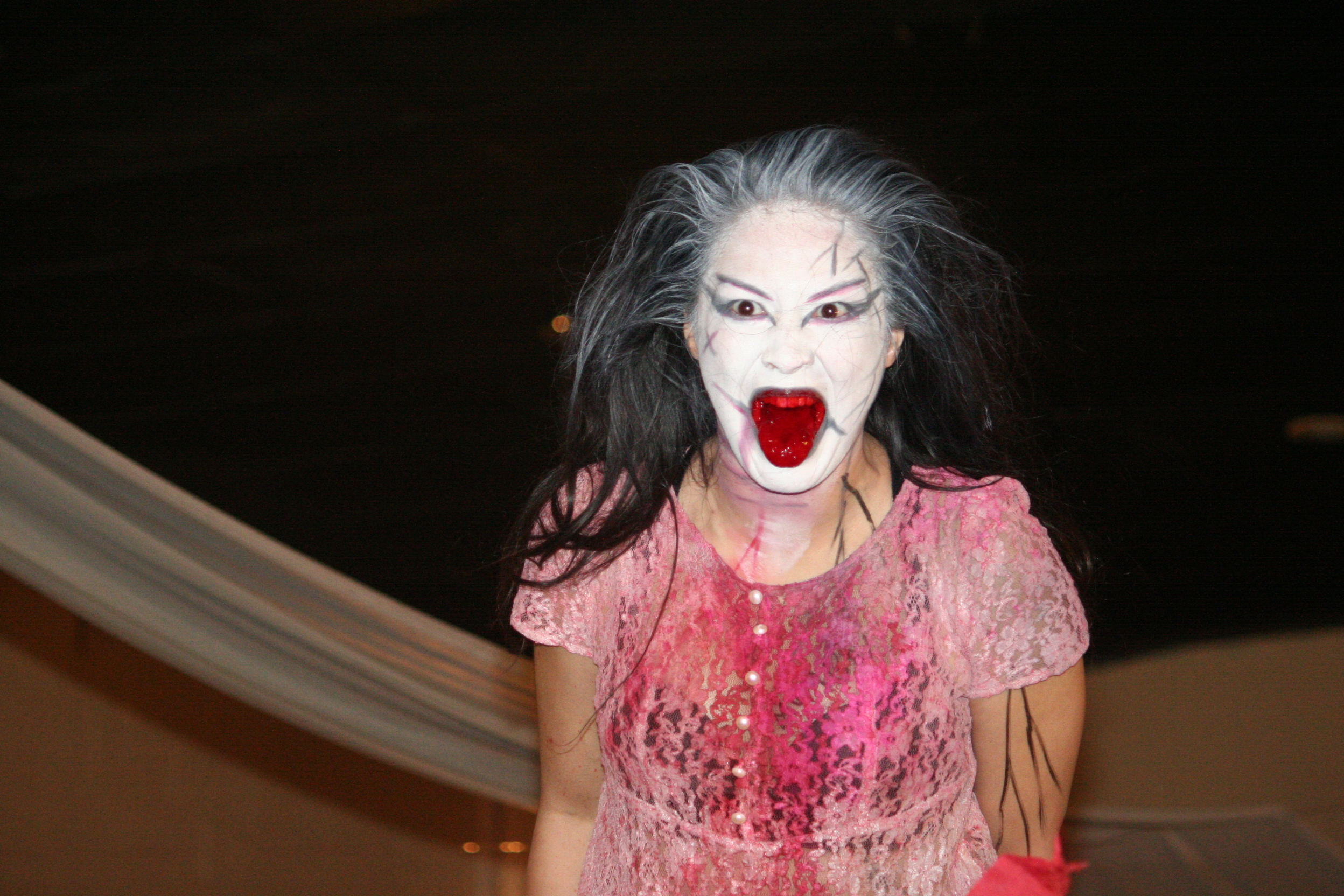 Su Yung en décembre 2017.